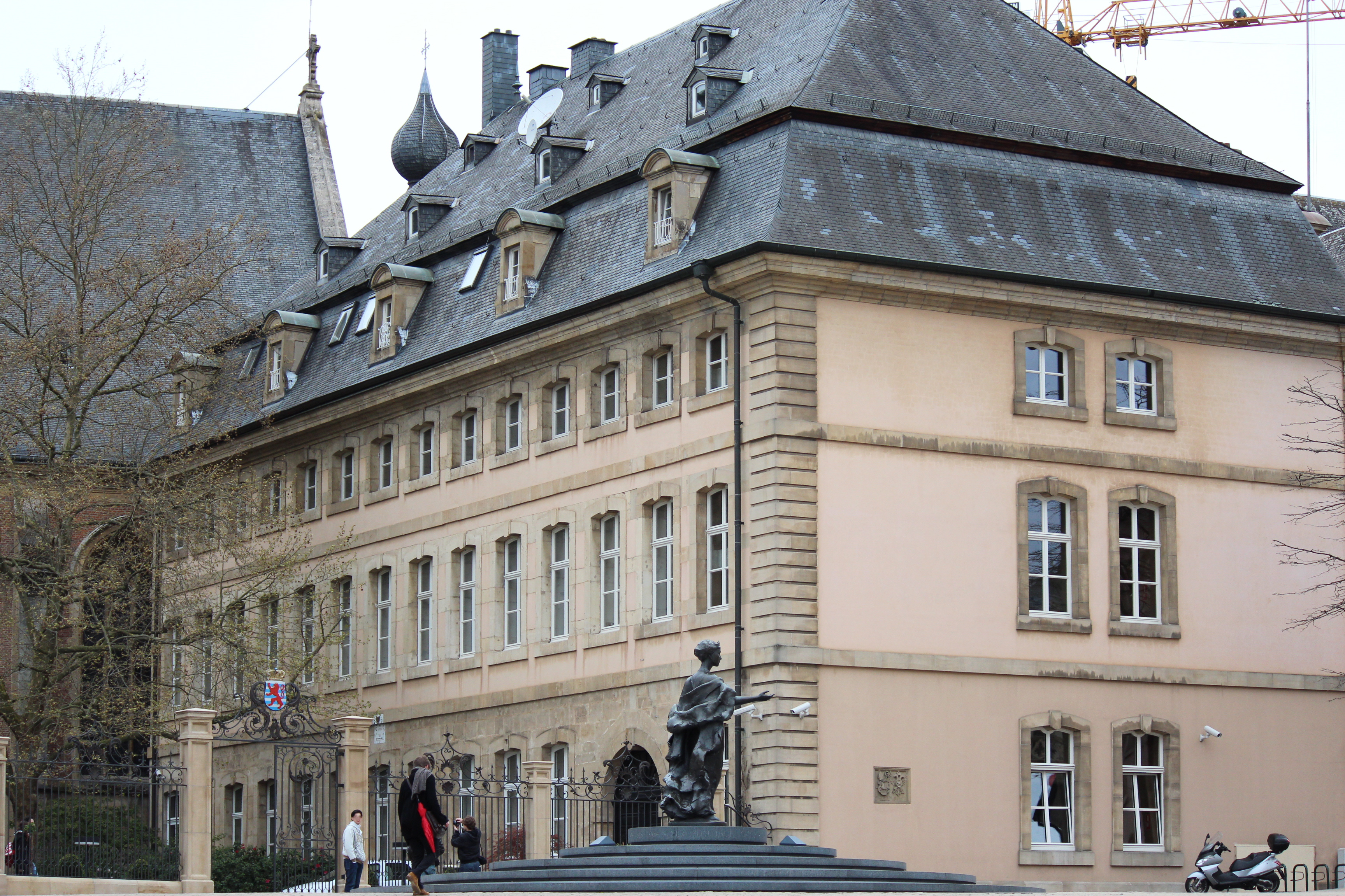 Ancien Refuge Saint-Maximin, siège du Ministère des affaires étrangères, à Luxembourg-ville, Place Clairefontaine.